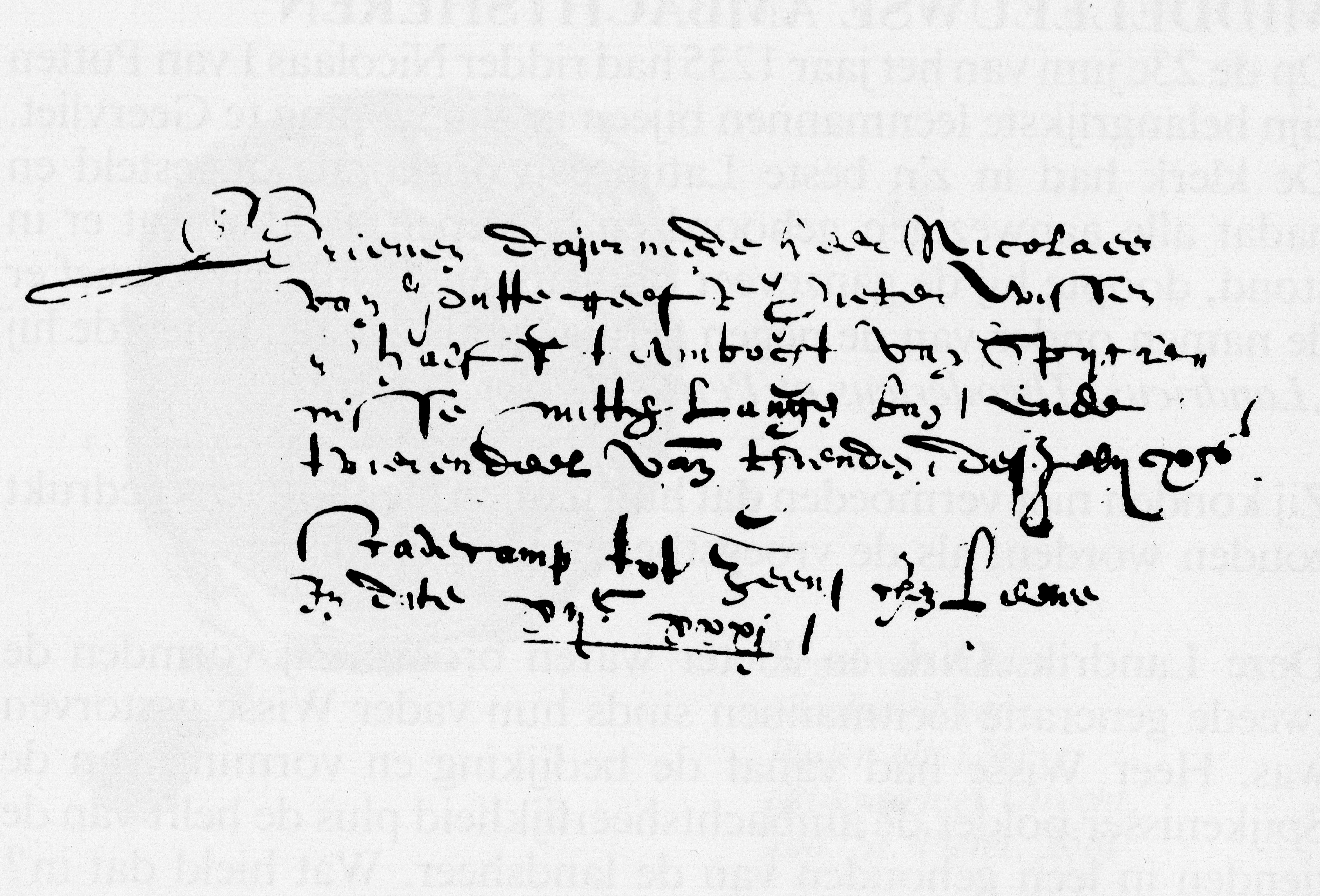 Eerste vermelding Spijkenisse in 1231. Het betreft een fragment uit een samenvatting van leenbrieven uit de Heerlijkheid Putten (die verloren zijn gegaan), gemaakt in 1552 door archivaris Cornelis Suys. De tekst luidtː "Brieven dair mede heer Nicolaes van Putte geeft Pieter Wissenzn. halff t ambacht van Spijckenisse mitten lagen ban ende t vierendeel van de thienden desgelijcxs Scadecamp tot Zeeuschen leene. In date xii xxxi" Oftewel: Brieven waarin Nicolaes I van Putten aan Pieter Wissenzn de helft van het rechtsgebied Spijkenisse (in leen) geeft, met de lage ban (lagere rechtspraak) en een kwart van de tienden op dezelfde manier van Scadecamp (= de polder Schiekamp ten westen van Spijkenisse, niet te verwarren met de latere wijk Schiekamp, die binnen de polder Spijkenisse ligt) volgens Zeeuws recht, getekend 1231.